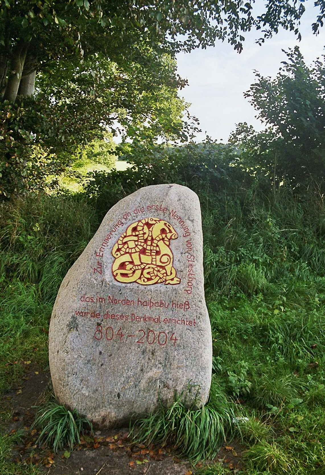 Source: made by WikiTour 2005 Description: (de:) Haithabu - Gedenkstein; Wortlaut: Zur Erinnerung an die erste Nennung von Sliesthorp, das im Norden Haiþabu hieß, wurde dieses Denkmal errichtet. 804 – 2004